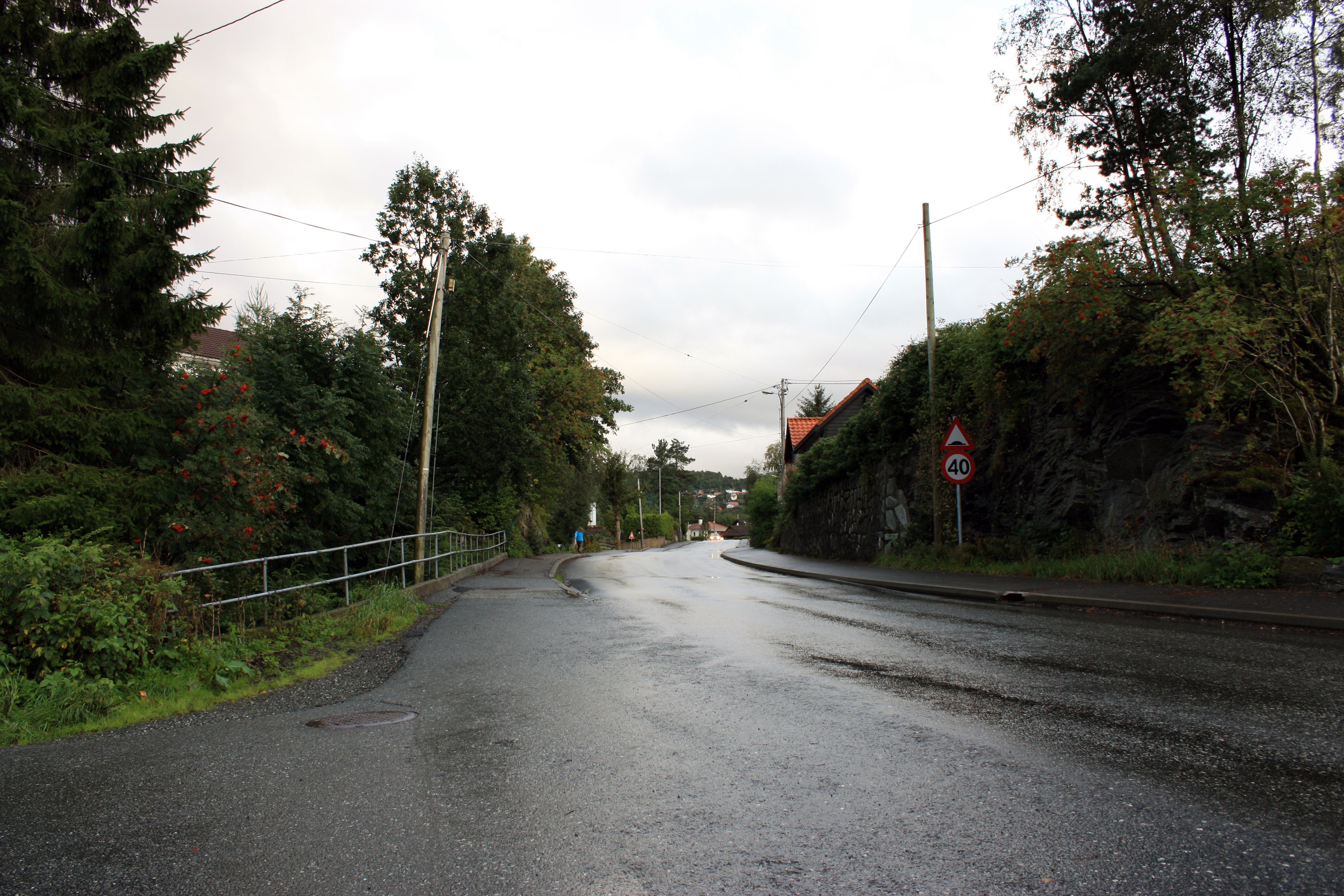 Elgvegen, Fana, Bergen.